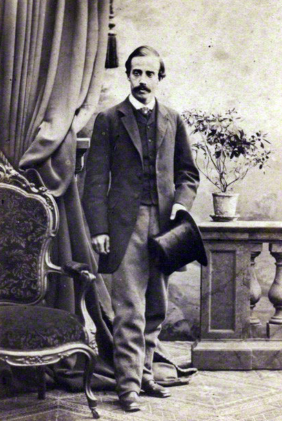 Albumen carte-de-visite.